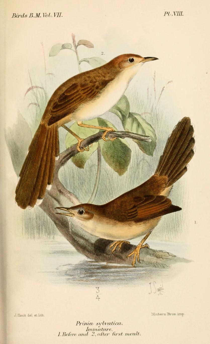 Prinia sylvatica, Jungle Prinia